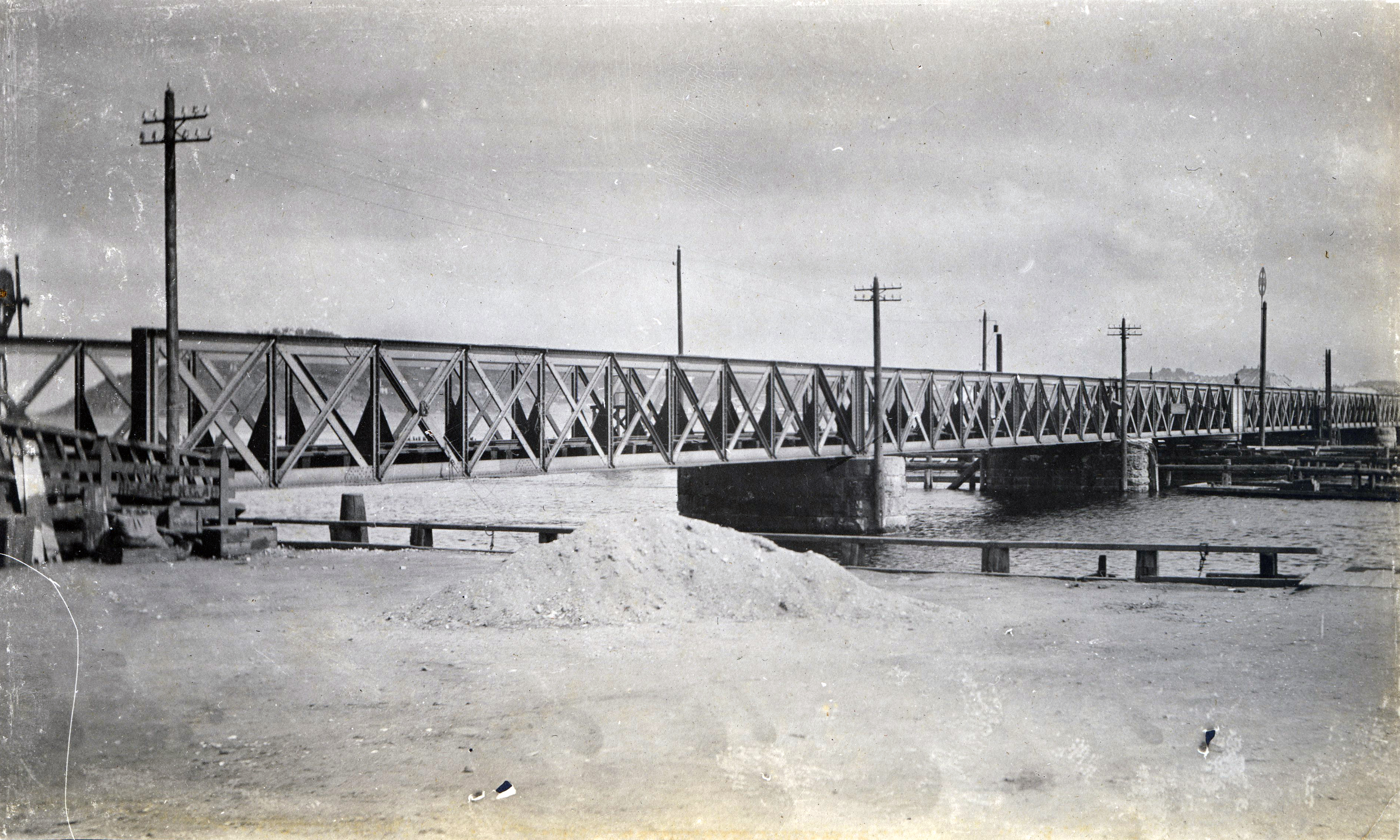 Format: Fotopositiv. År: Tidlig 1900-tall, ca. 1910 - 1915. Fotograf: Ukjent, mulig Ingebrigt Lunde.